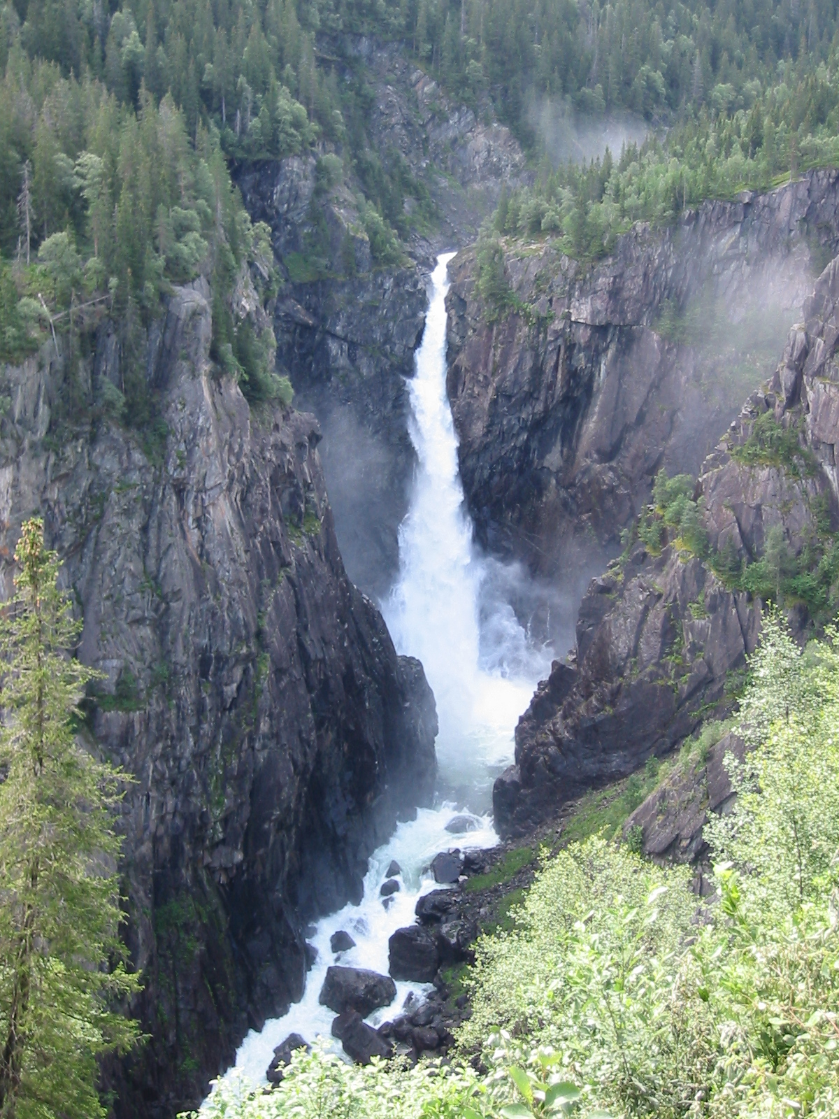 Rjukanfossen (waterfall) in Rjukan, Tinn, Telemark, Norway taken during high water level in July 2007.